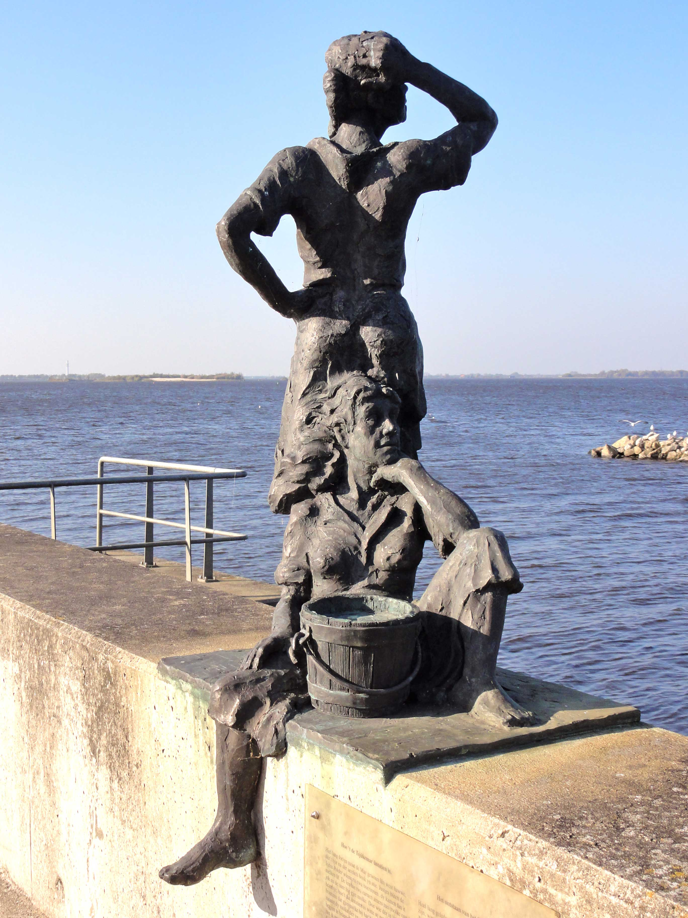 "Tsjûke en March", ontwerper Frits Stoop, uitvoering Alie Stoop-Jager en Frits Stoop